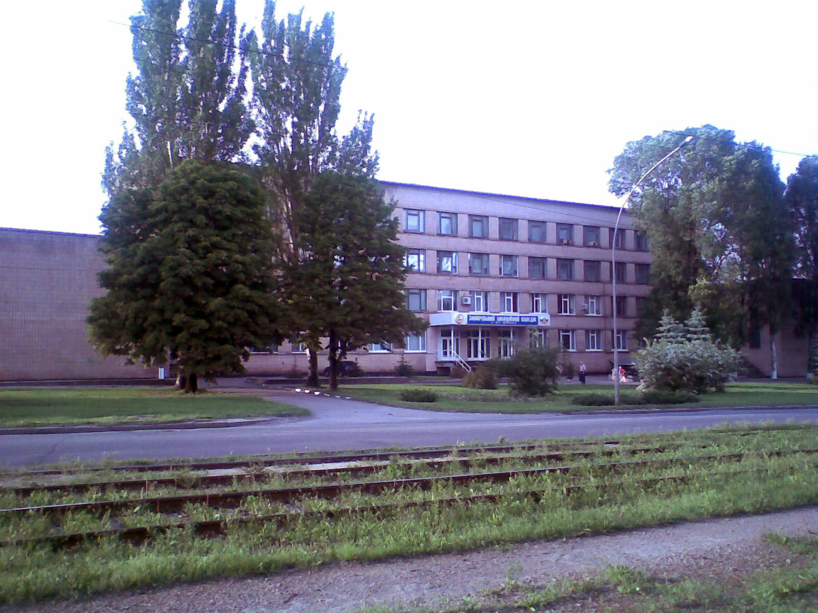 Запорожский авиационный колледж им. А. Г. Ивченко